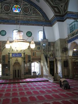 Al-Jazaar Mosque in Akko, Israel. Built from 1800-1814. / Džamija Al-Džazar u Akku, Izrael. Građena od 1800. do 1814. godine.